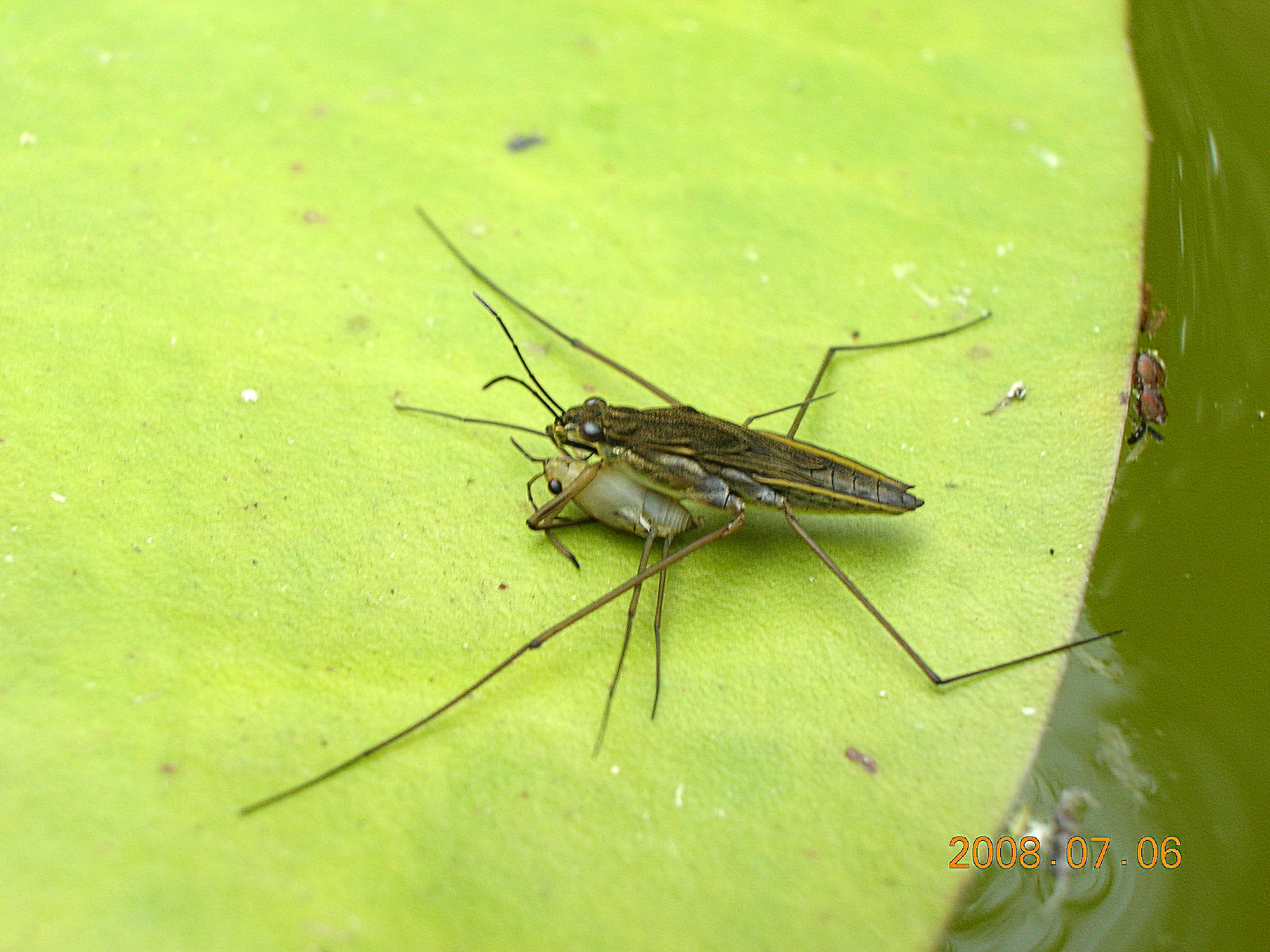 Nartnik duży (Gerris lacustris), canibalism, Poland